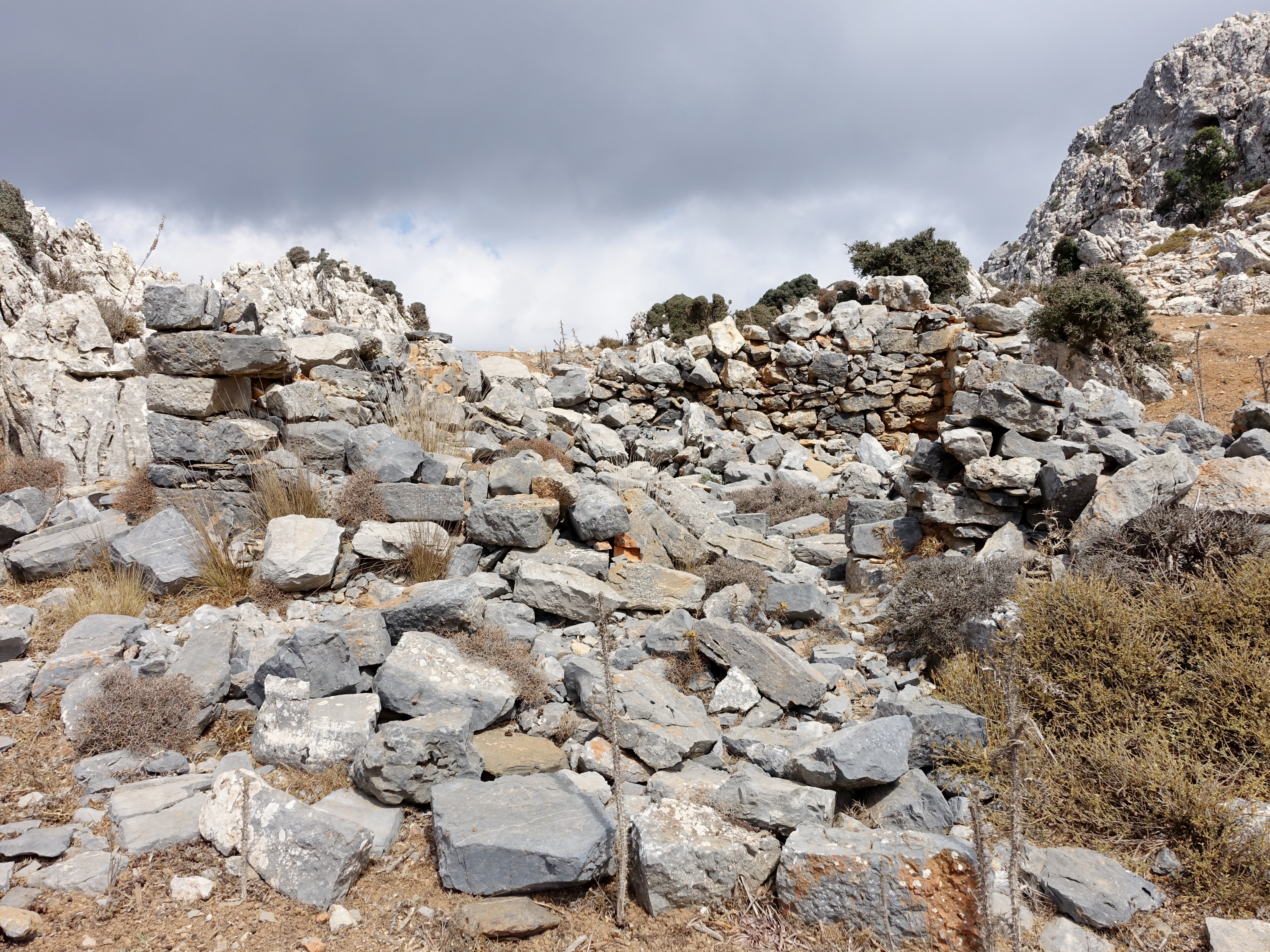 Ausgrabungsstätte der Siedlung Karphi, Kreta, Griechenland